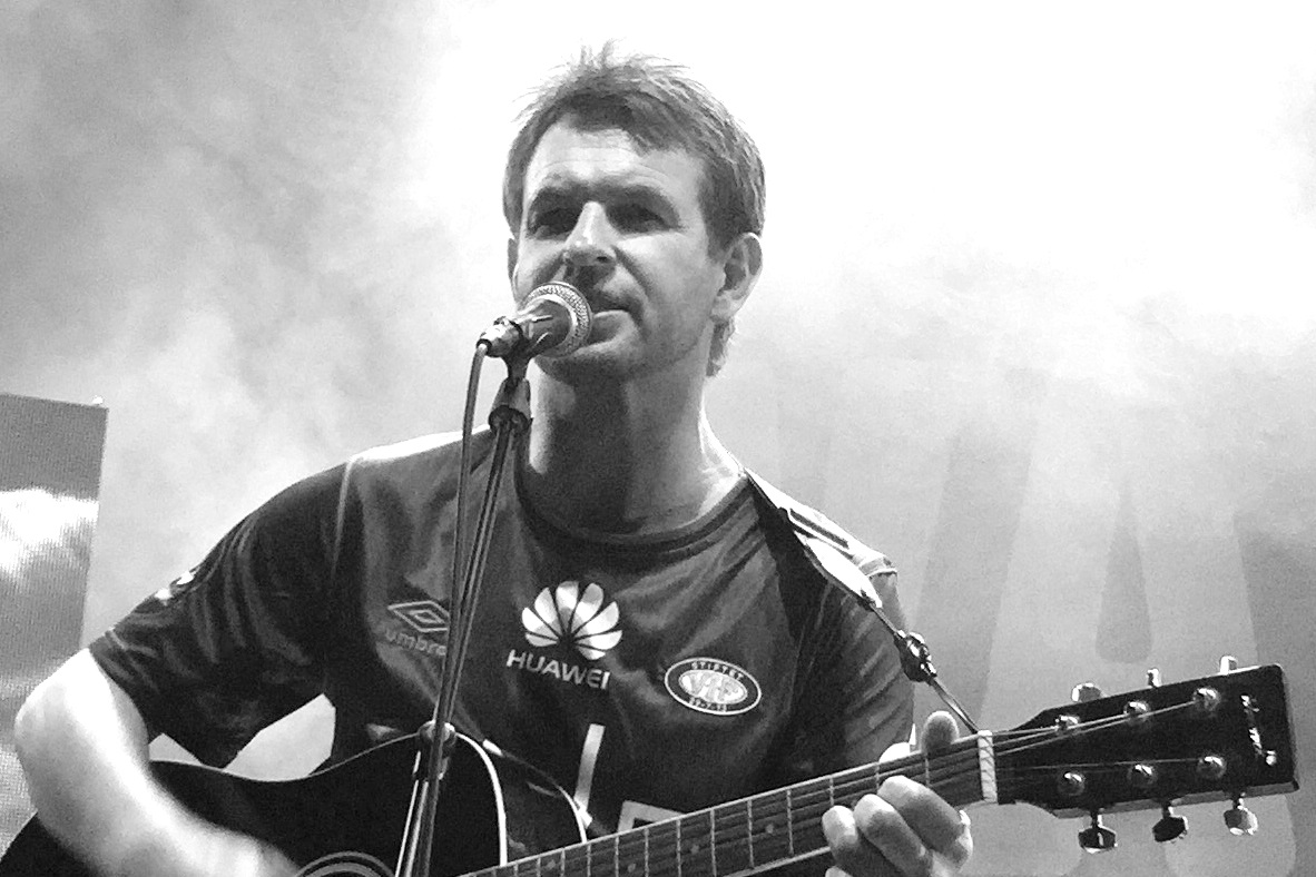 Espen Haug, tidligere fotballspiller